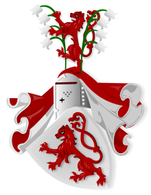 Source: Wikepedia Commens